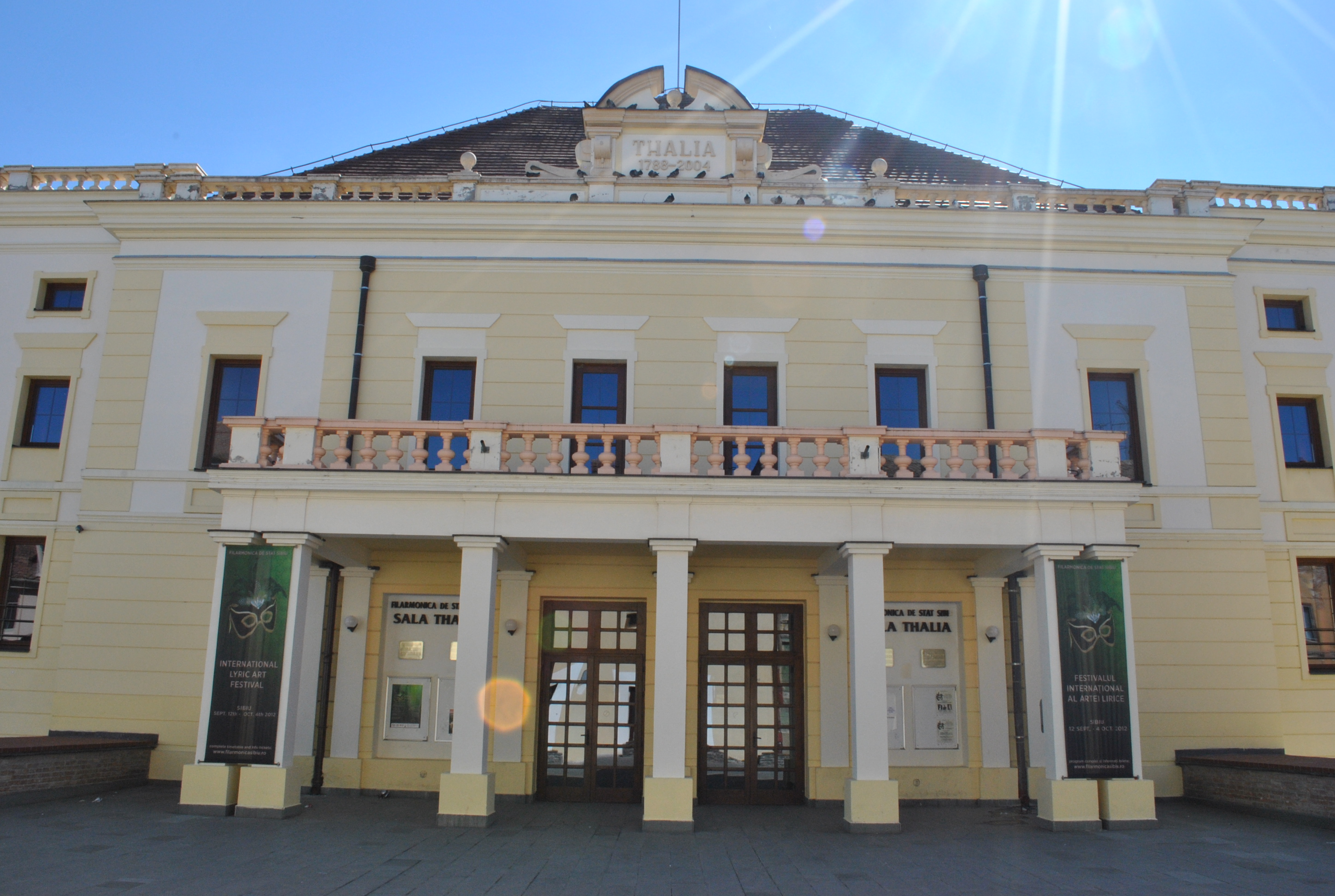 Sala Thalia (teatru orășenesc între 1788- 1945), construită pe Turnul Gros, 1540